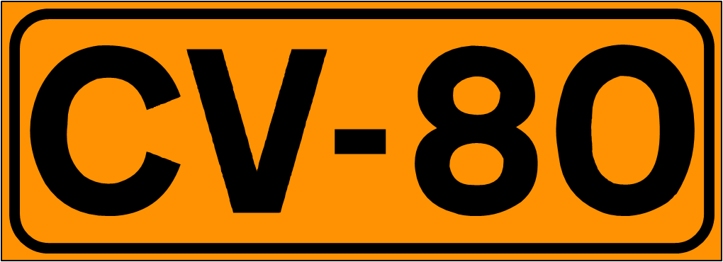 Inidcador de la Carretera de la Comunidad Valenciana CV-80